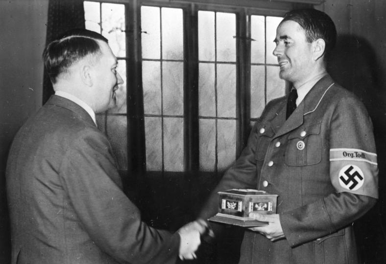 Fritz-Todt-Ring für Reichsminister Speer Der Reichsminister für Bewaffnung und Munition Albert Speer, erstattete dem Führer im Führerhauptquartier im Beisein der führenden Männer der Selbstverantwortung der deutschen Rüstungsindustrie und der Amtschefs seines Ministeriums Meldung über die außerordentliche Steigerung der Waffen-, Panzer- und Munitionserzeugung im abgelaufenen Jahr. In Anerkennung seiner einmaligen Leistungen auf dem Gebiete der deutschen Technik überreichte der Führer dem Reichsminister Albert Speer den Fritz-Todt-Ring der Deutschen Technik in einer mit der Bildnisplakette von Dr. Fritz Todt gezierten silbernen Kassette. 4.6.43 [Herausgabedatum] Information added by Wikimedia users.